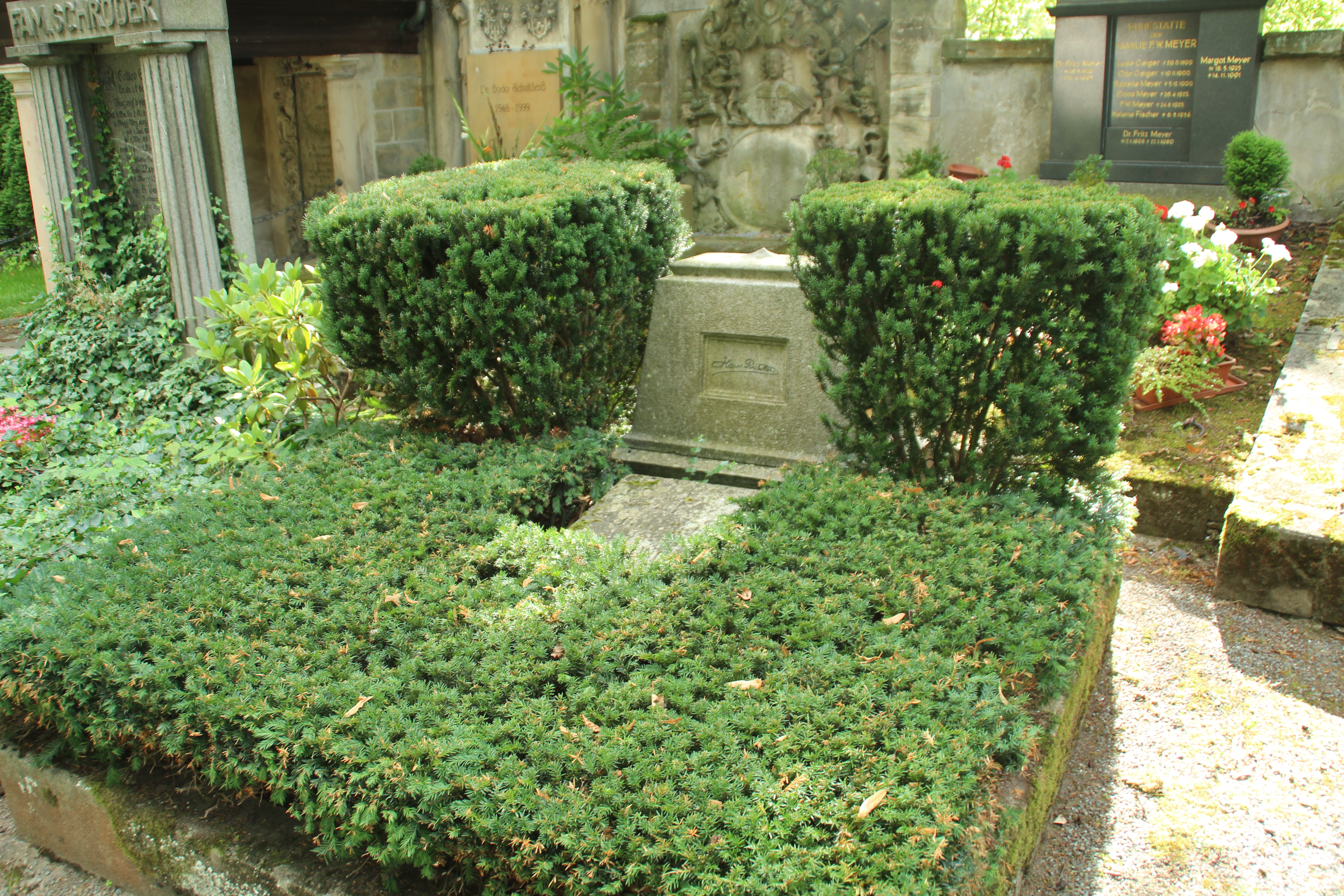 Grab von Hans Richter (Dirigent) zu Bayreuth